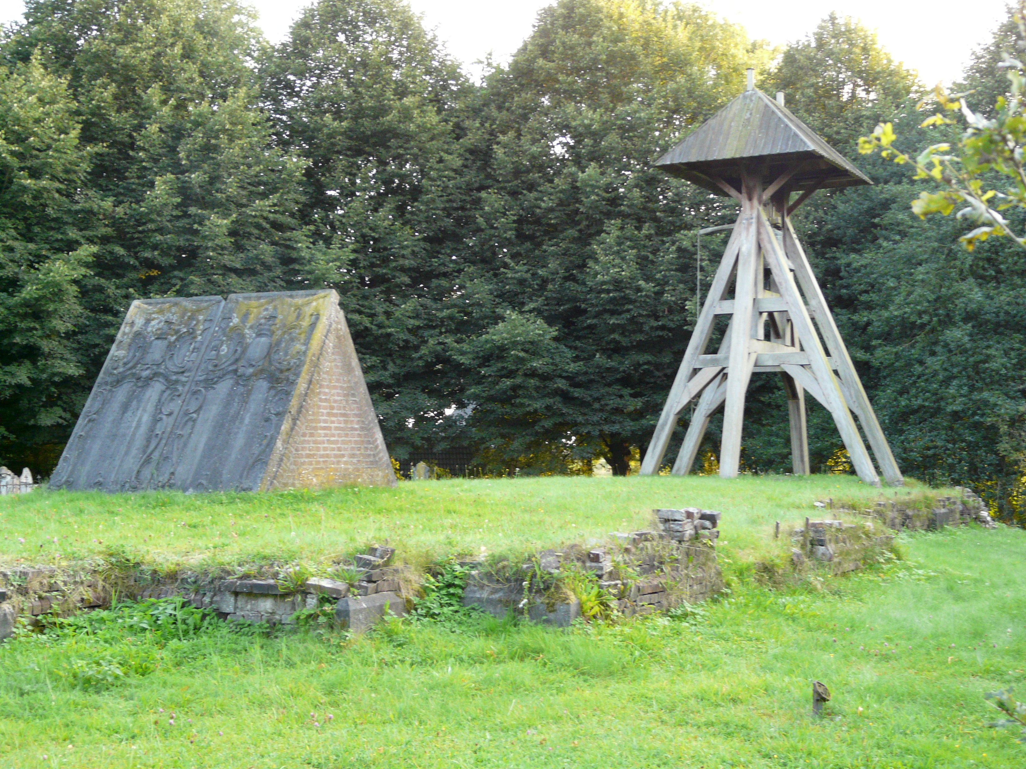 Tsjerkhôf Ald Beets, it plak fan de eardere Adelstsjerke